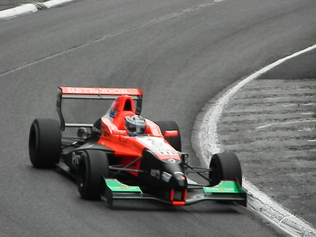 Paul-Loup Chatin sur Formule Renault 2.0 ALPS lors du Grand Prix de Pau 2012.